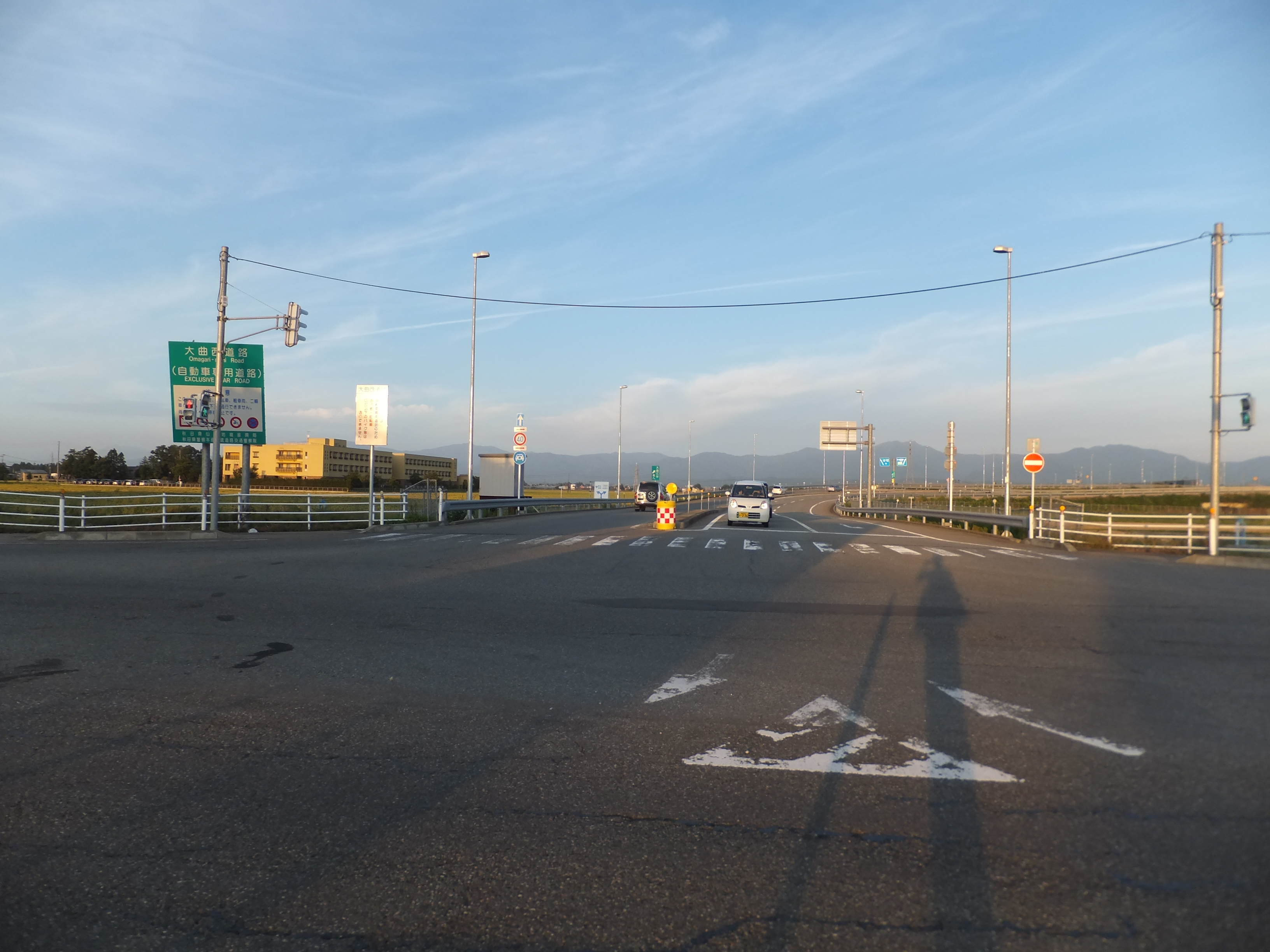 大曲西道路飯田交差点